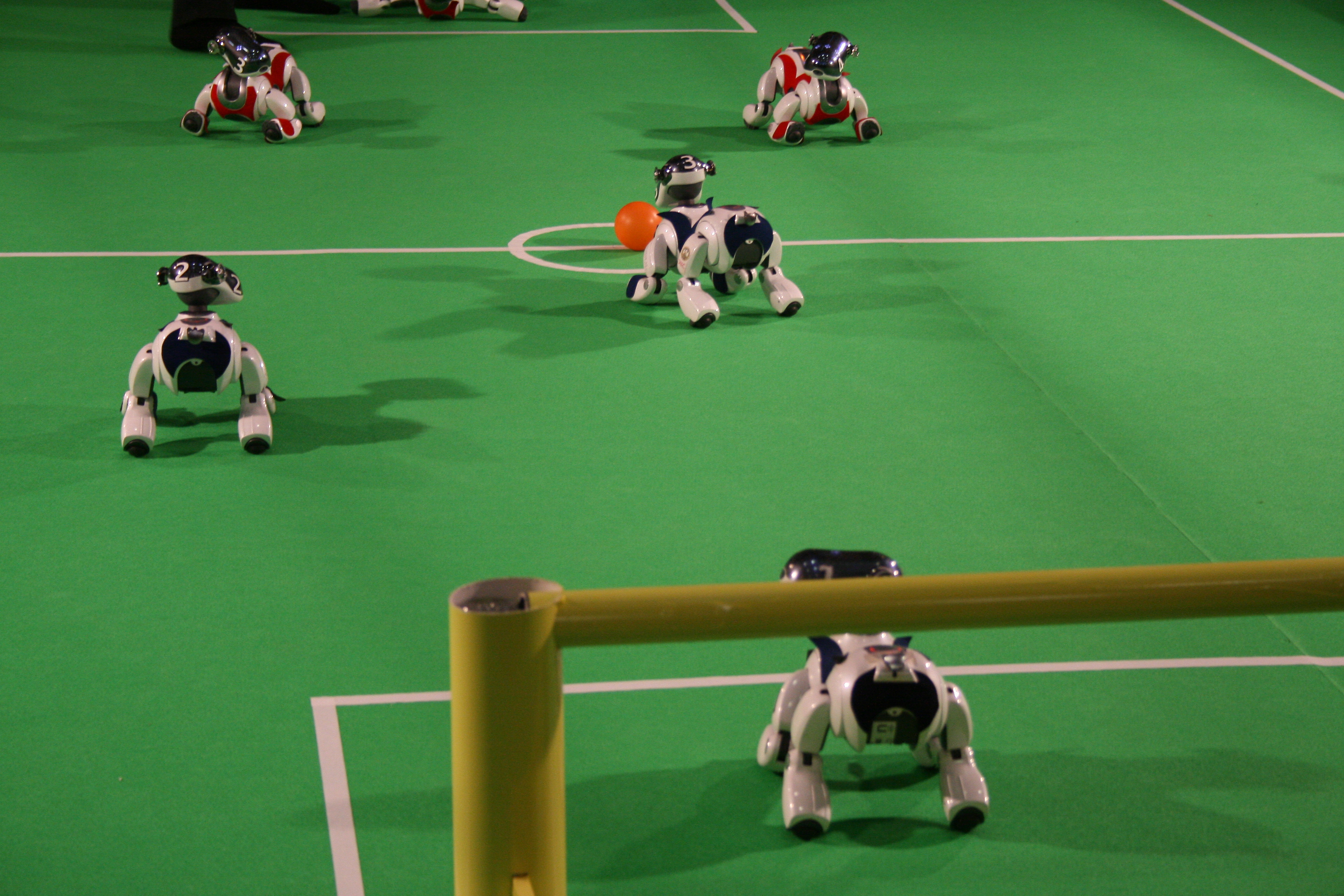 Hala! La novedad del año! La RoboCup!!!! Nota: las máquinas no nos dominarán ni a la de tres.